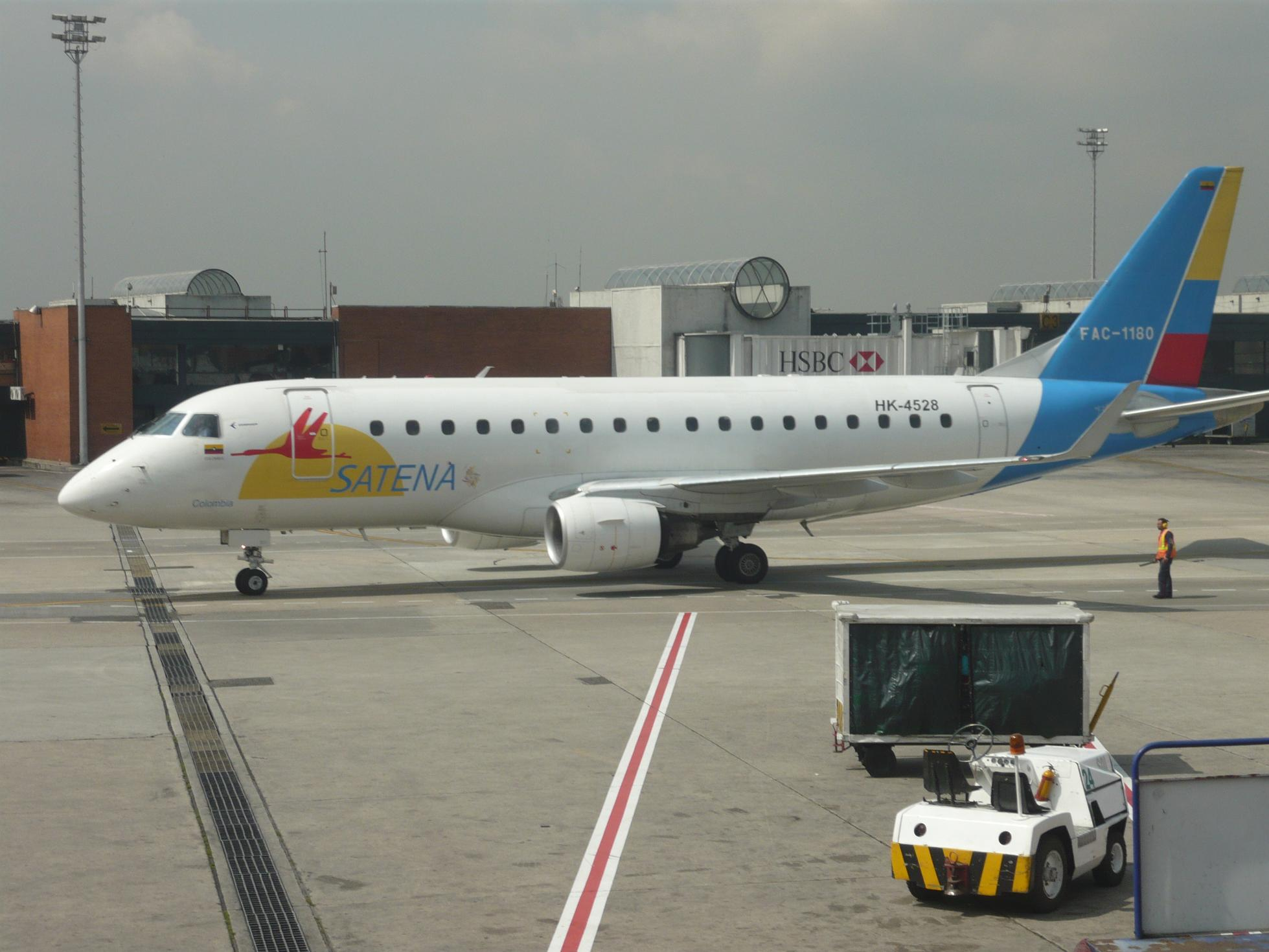 ERJ 170 en el aeropuerto El Dorado